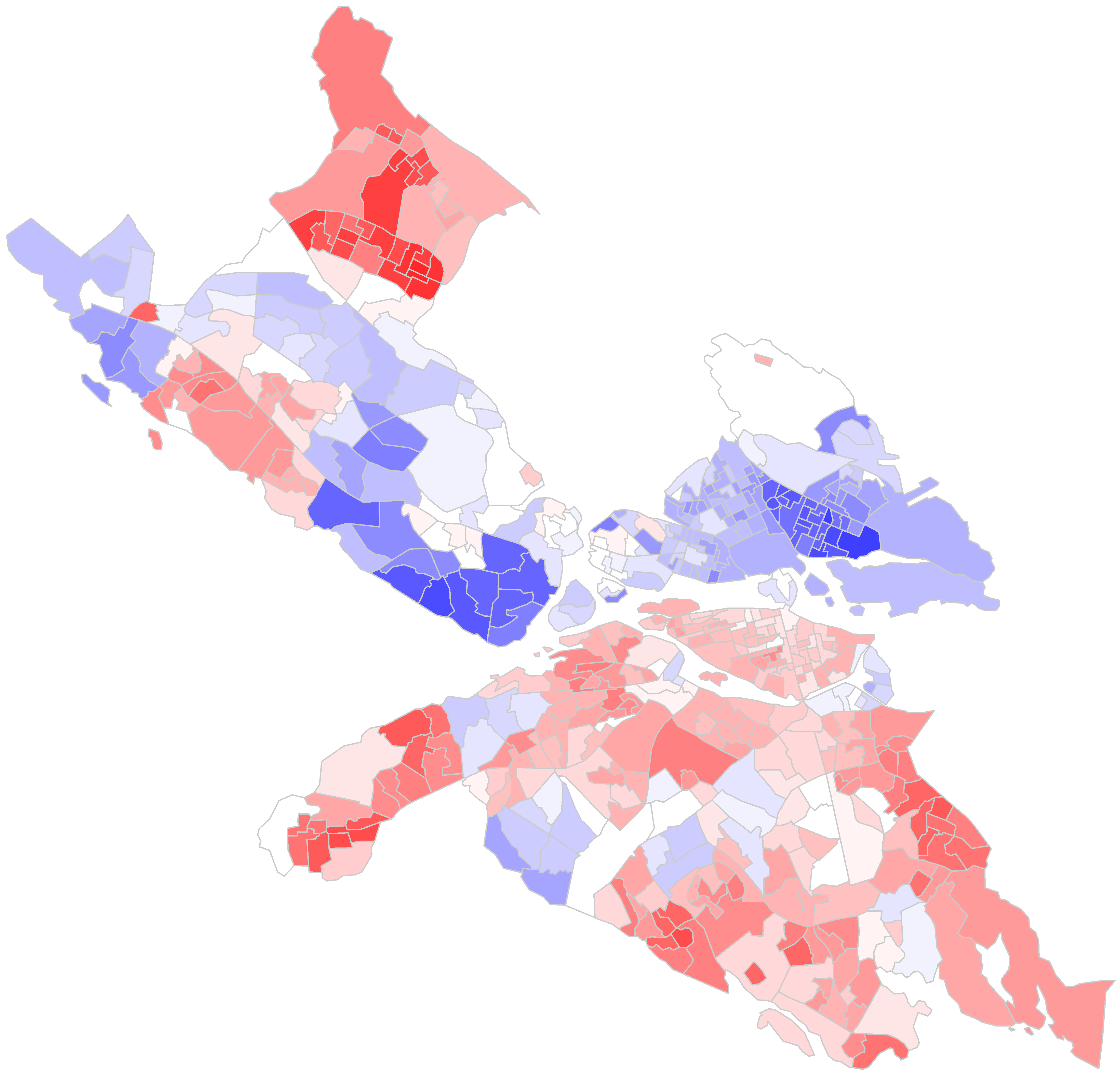 Valresultatet i Kommunfullmäktigevalet i Stockholm, graderat från rött (S+MP+V+FI) till Blått (M+C+FP+KD). Vitt innebär att stödet är jämnt.